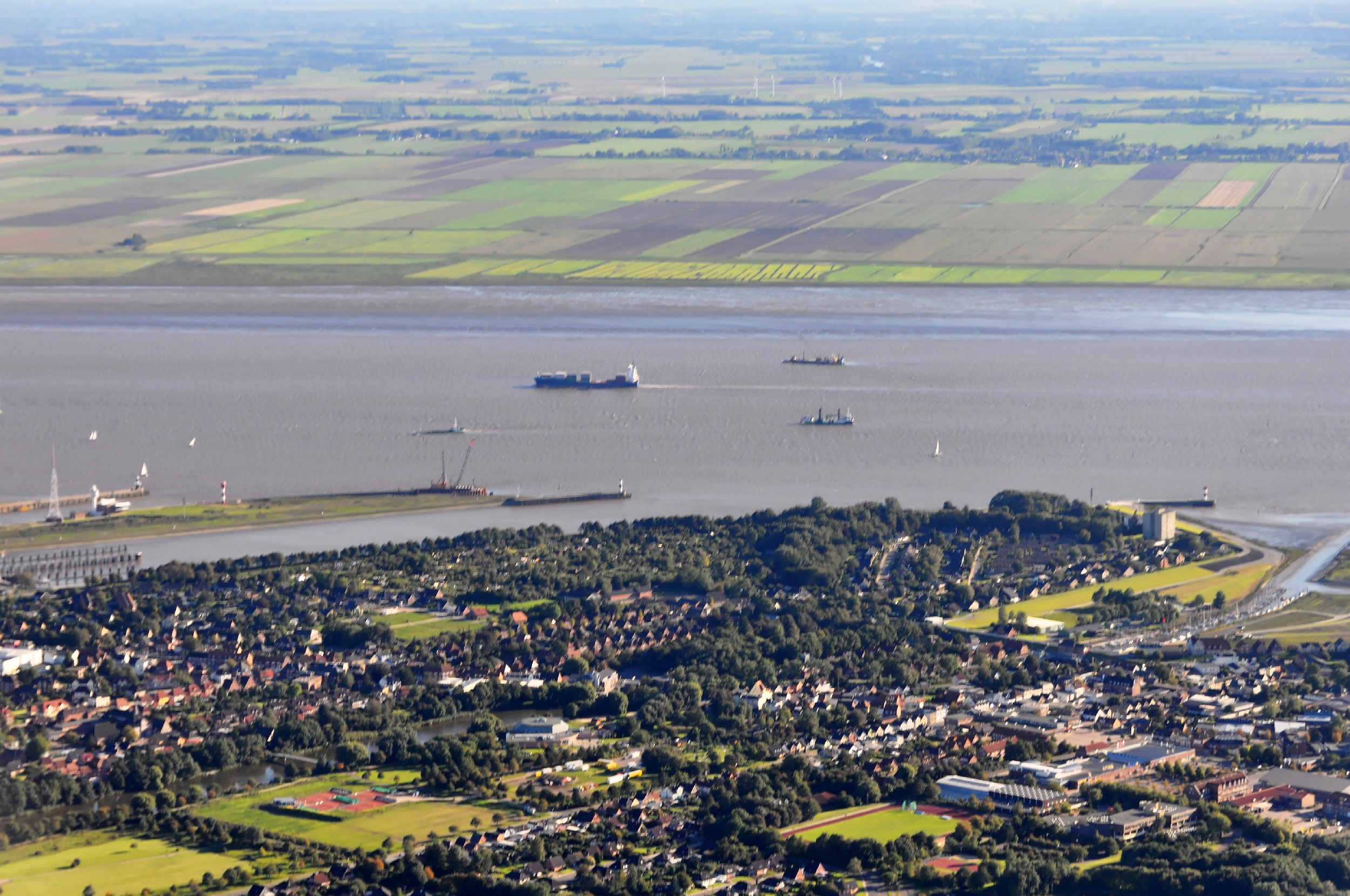 Luftaufnahmen Nordseekueste 2013-09